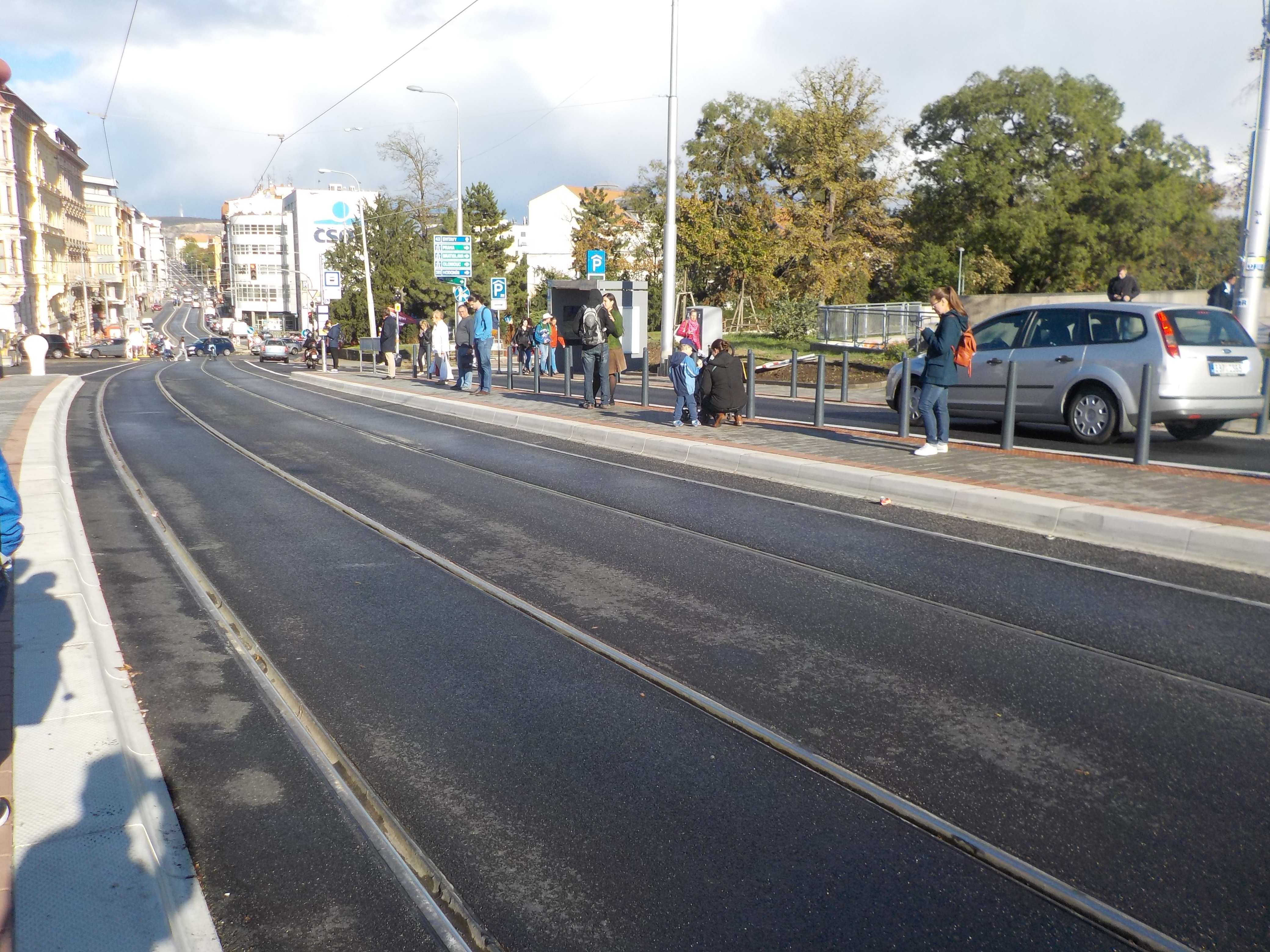 Pohled na tramvajovou stanici Moravské náměstí po rekonstrukci v létě 2018.